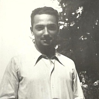 Il curatore editoriale e traduttore Giorgio Monicelli da giovane (intorno agli anni quaranta).